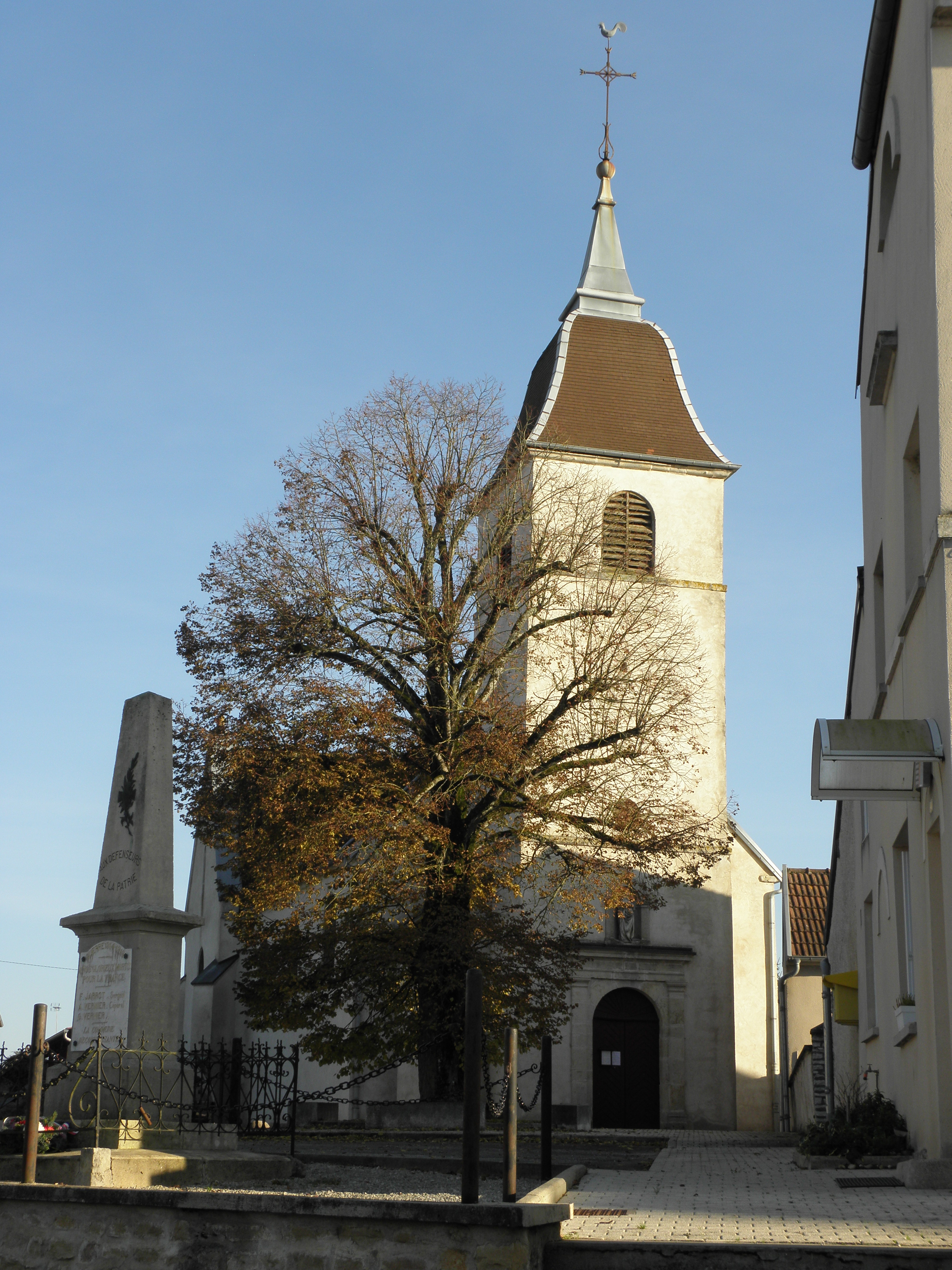 CHAMPTONNAY l'Eglise